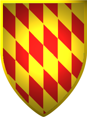 Grb Sankovića